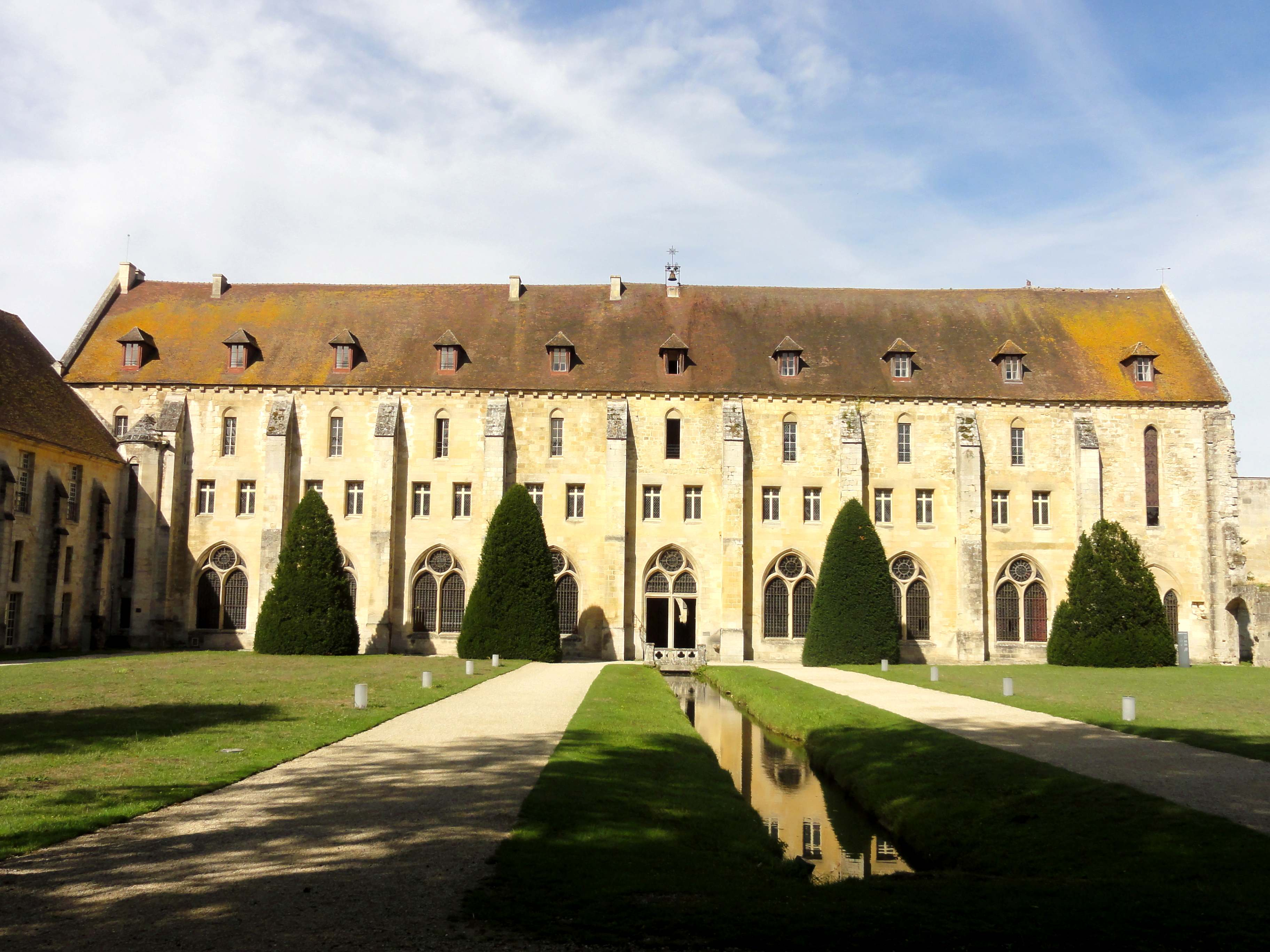 Bâtiment des moines - voir titre.